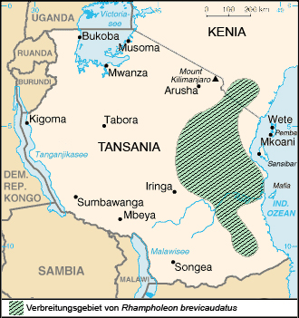 Verbreitungskarte - Rieppeleon brevicaudatus